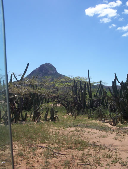 Cerro La Teta, La Guajira Colombia